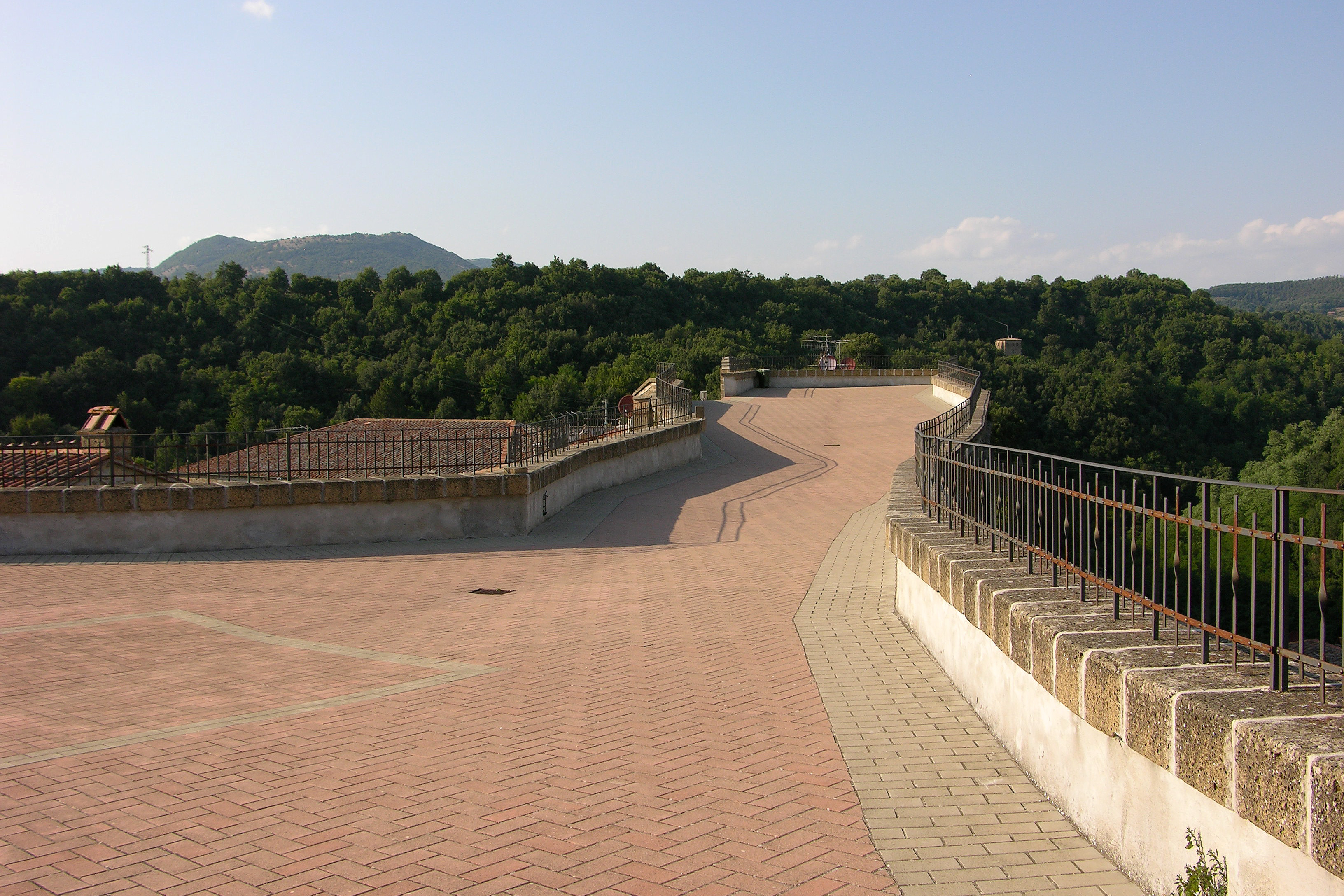 Piazzale del Masso Leopoldino in Sorano (GR) Italia.